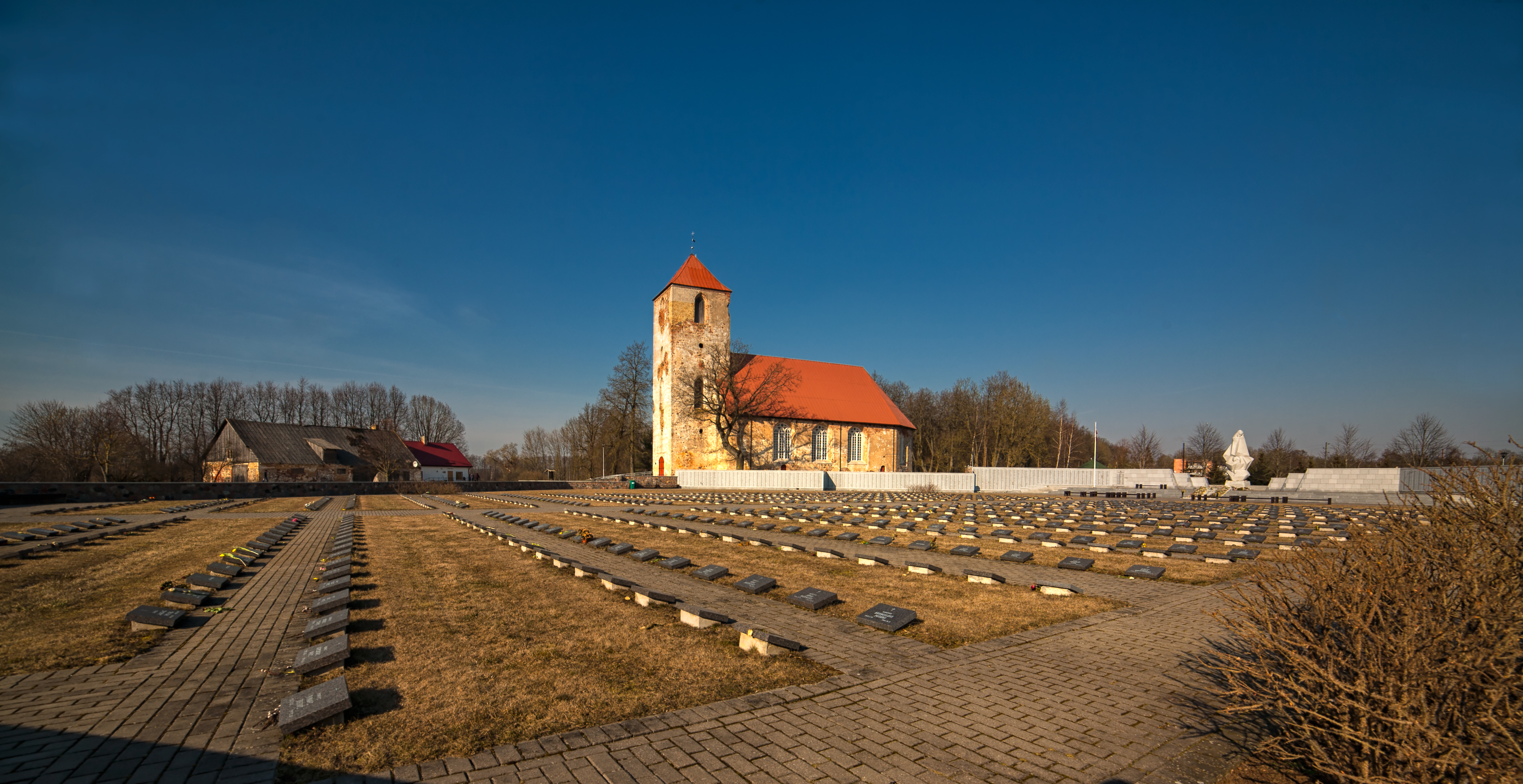 Lestenes luterāņu baznīca, Lestene